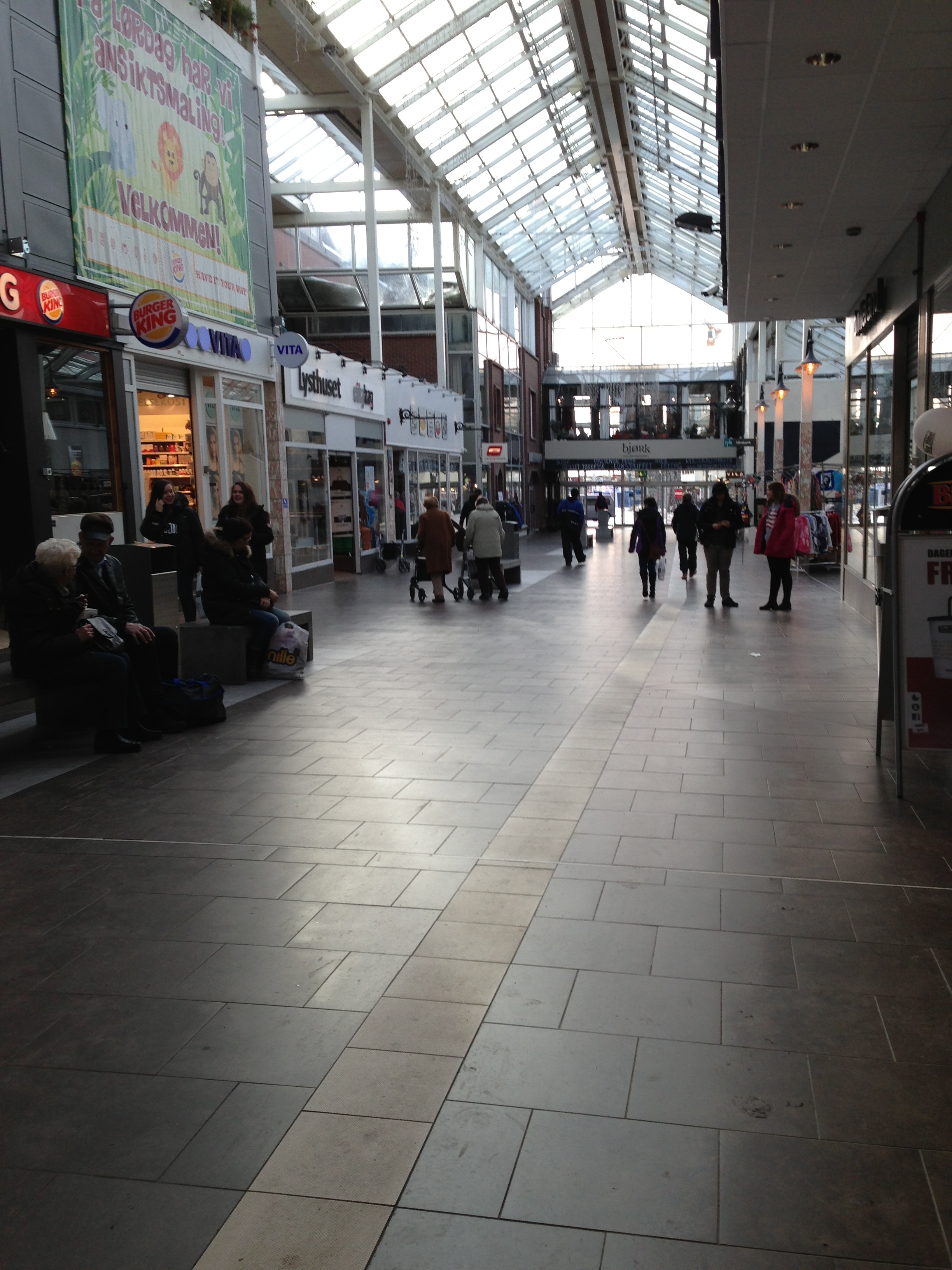 Glasshuset i Bodø